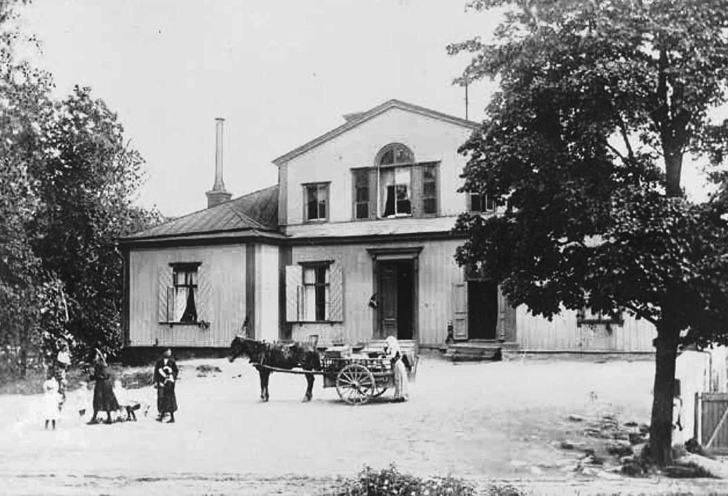 Rålambshovs huvudbyggnad 1902